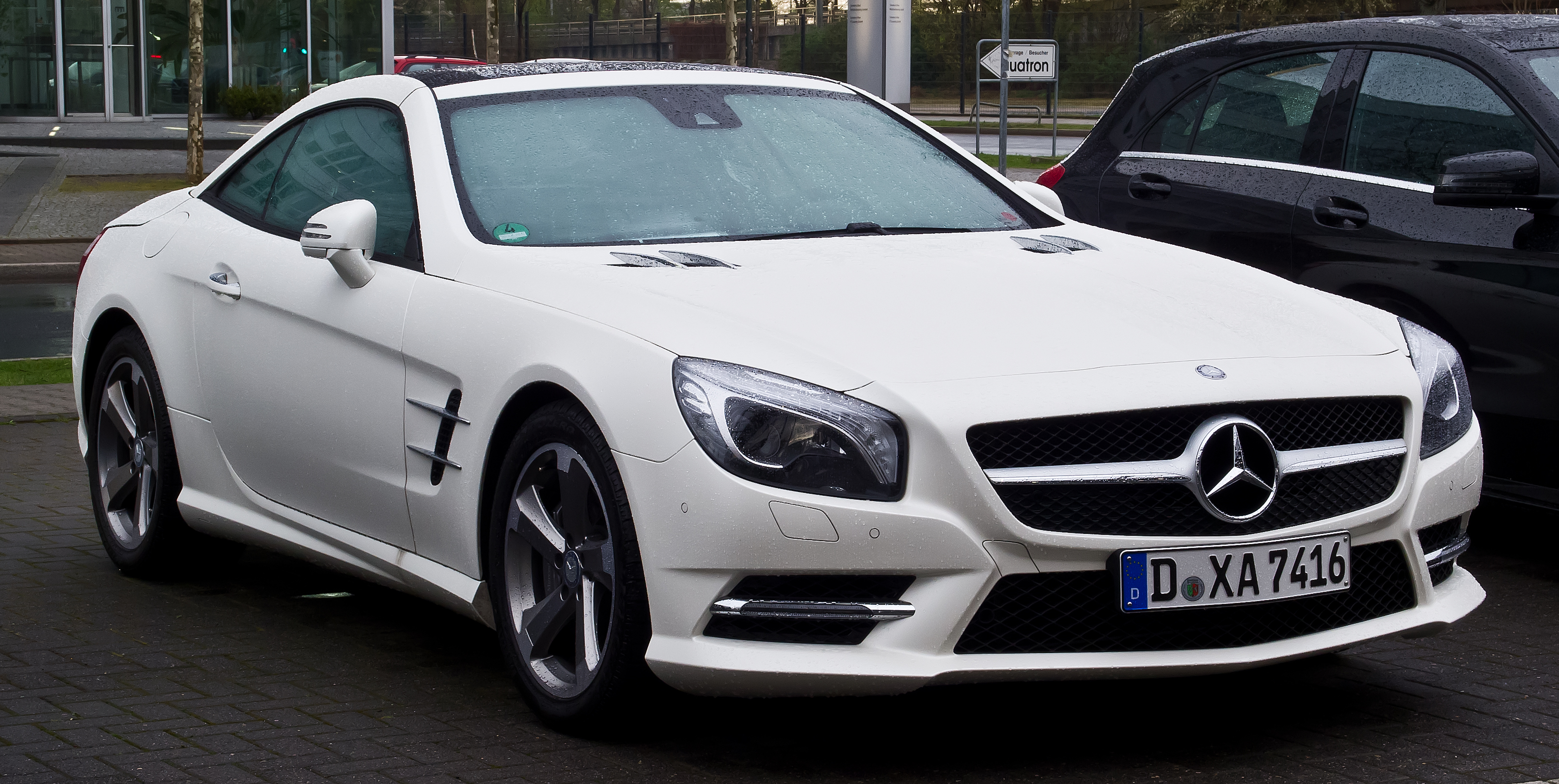 Mercedes-Benz SL 350 AMG Line (R 231)